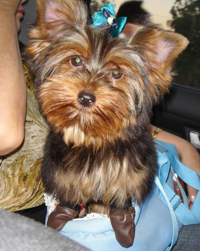 Golden Flake of Mother Bitch, cão macho da raça yorkshire terrier, com dois anos de idade.